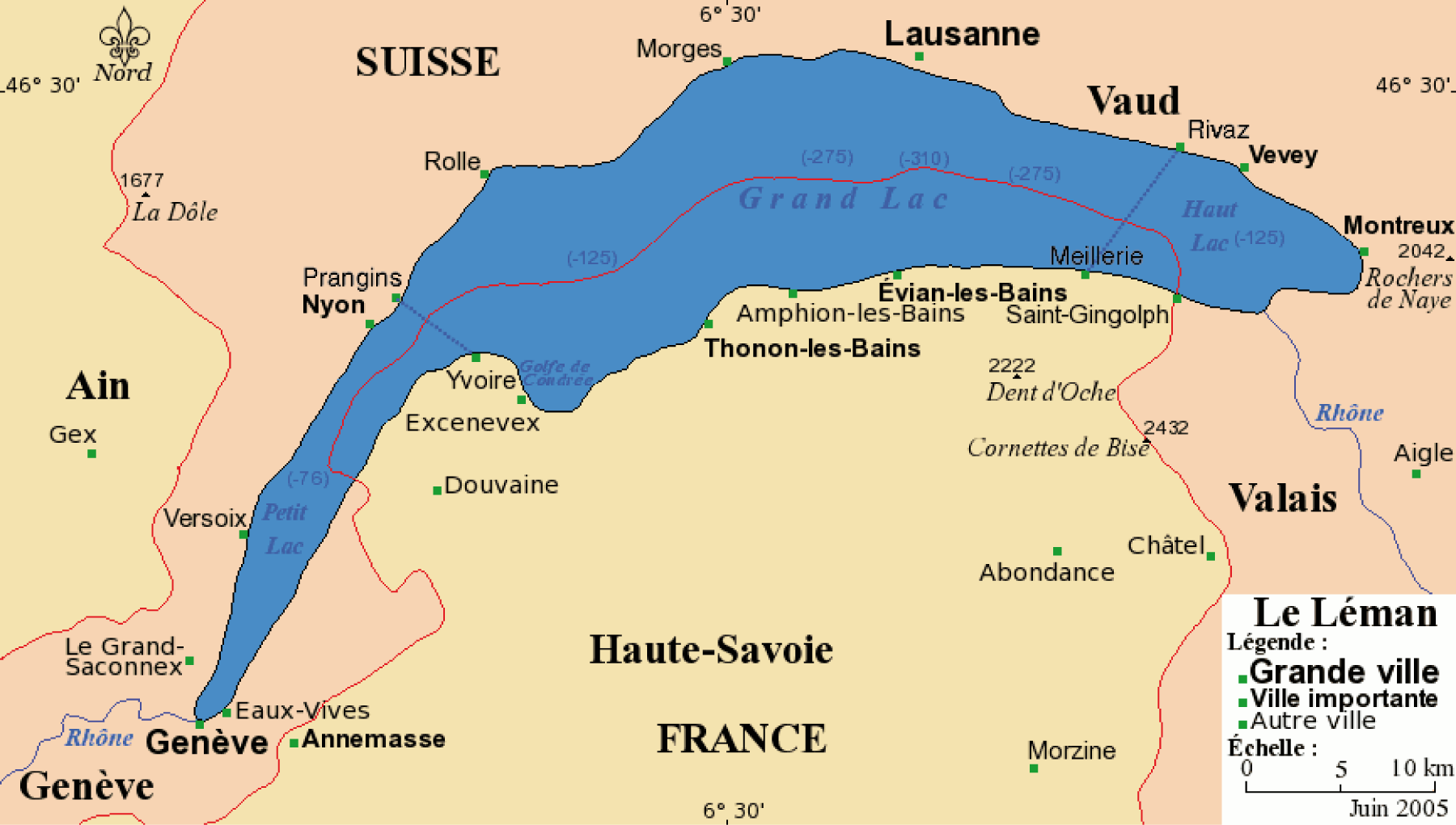 Carte du Léman avec ses villes principales. Projection de Mercator Fond de carte provenant de